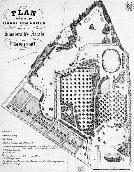 Plan des Jacobi'schen Gartens und seiner Baulichkeiten, um 1840: Friedrich Heinrich Jacobi formte die barocke Anlage um 1840 zu einem Kunstgarten im landschaftlichen Stil um. Neben der erhaltenen Allee entstanden fünf Bereiche mit Obstbaumhainen, verschlungenen Wegen, die mehrfach die Düssel querten und dem Teich. Einbezogen wurden die verschiedenen gärtnerisch-landwirtschaftlich genutzten Gebäude. Bei dem Jacobigarten handelte es sich wohl um das älteste Beispiel eines Landschaftsgartens im englischen Stil im engeren Düsseldorfer Raum.